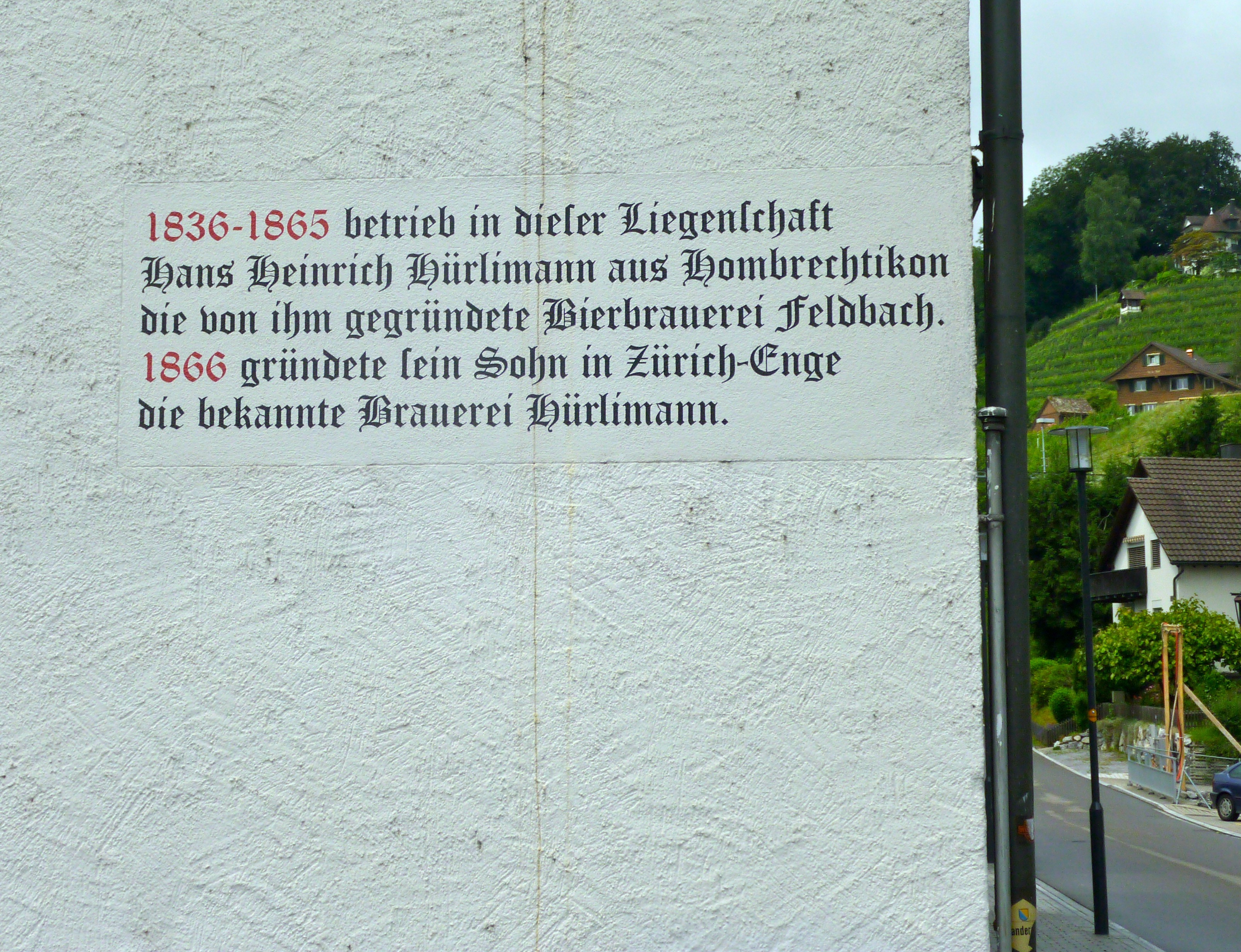 Gründungshaus derde:Brauerei Hürlimann in Feldbach (Hombrechtikon)